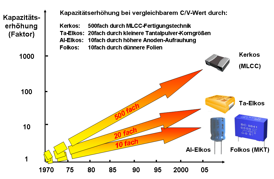 Miniaturisierung bei Kondensatoren von 1970 bis 2005